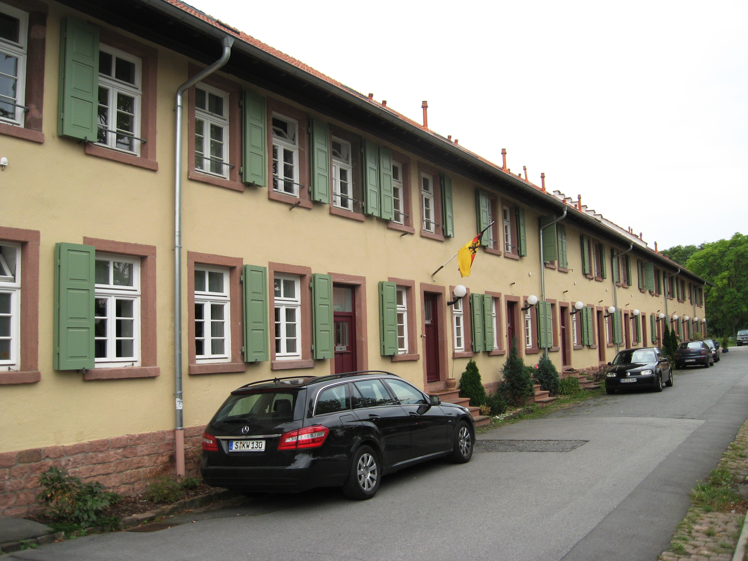 Mannheim, Spiegelmanufaktur (heute Saint-Gobain Glass Deutschland; Werkssiedlung, Straßenseite